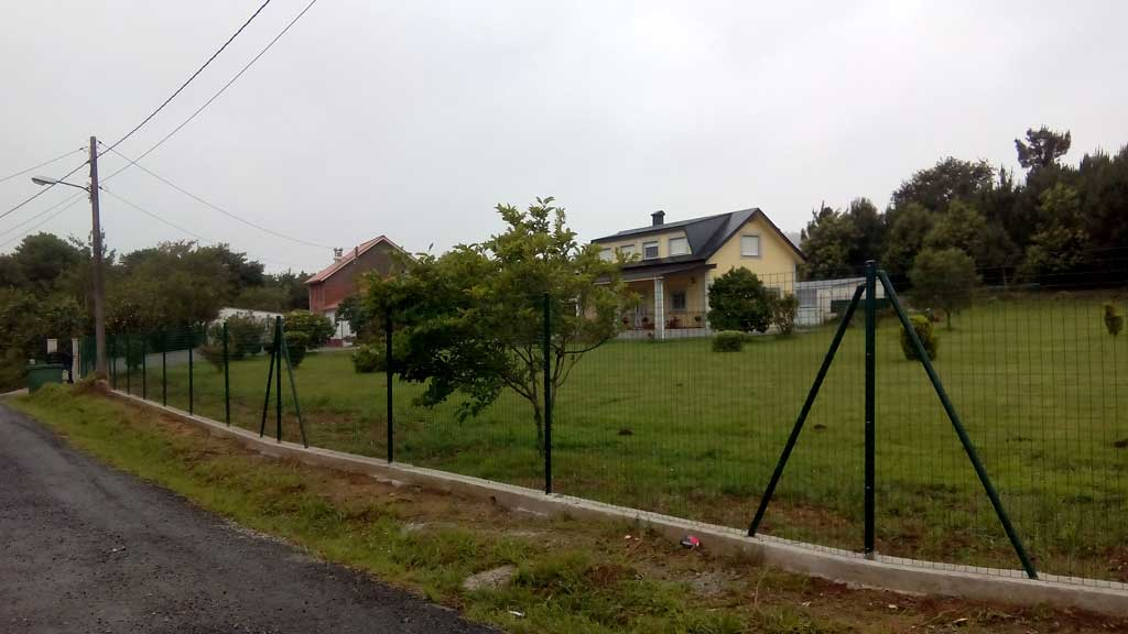 Vista da Ruxida, Trasancos.